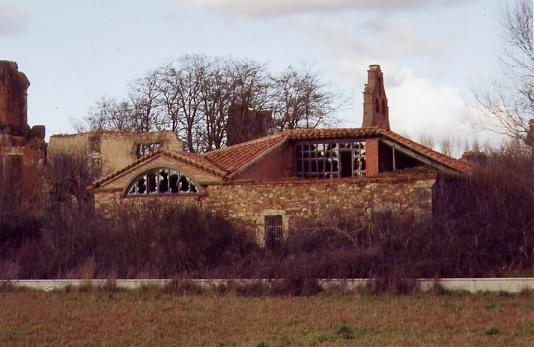 Ex monasterio de Santa María, en San Esteban de Nogales, León, España